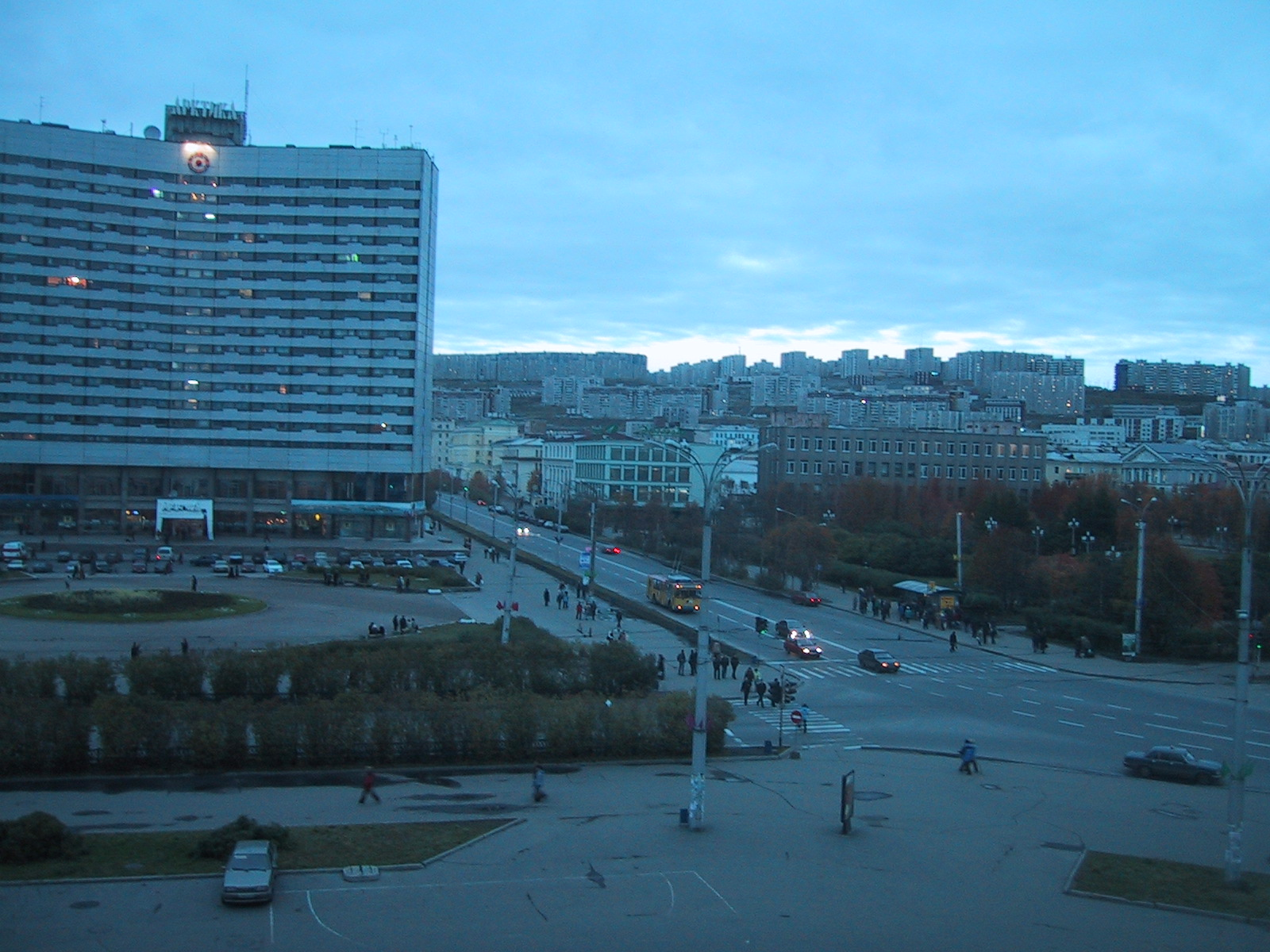 Centrum Murmanska (Rusko) při západu slunce